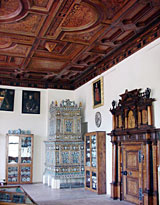 Im Porzellansaal des Schlosses Starhemberg befindet sich ein bunt-glasierter Renaissance-Kachelofen aus dem Jahr 1580.